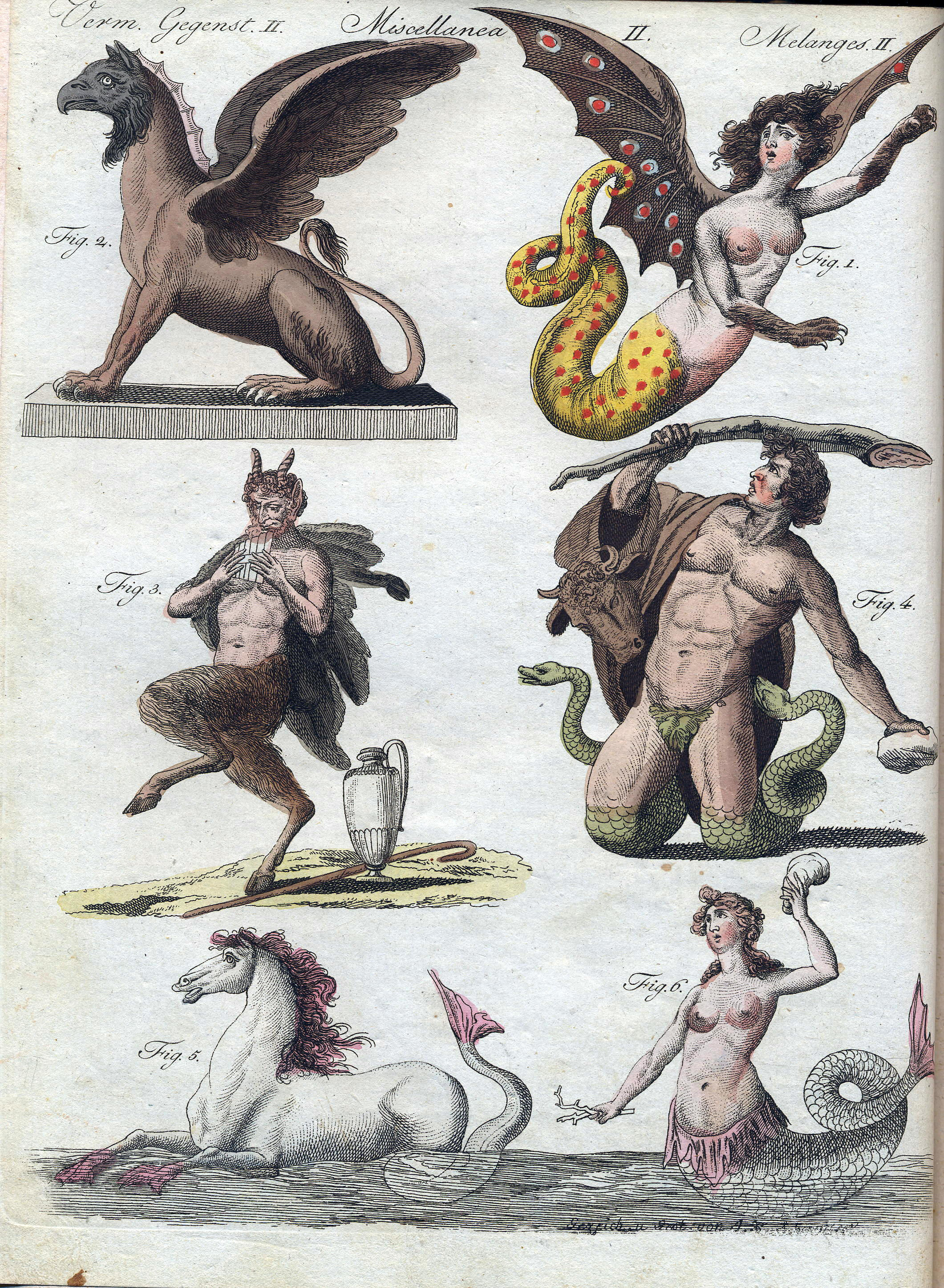 Friedrich Justin Bertuch, Bilderbuch für Kinder, 1790-1830, Fabelwesen 2.